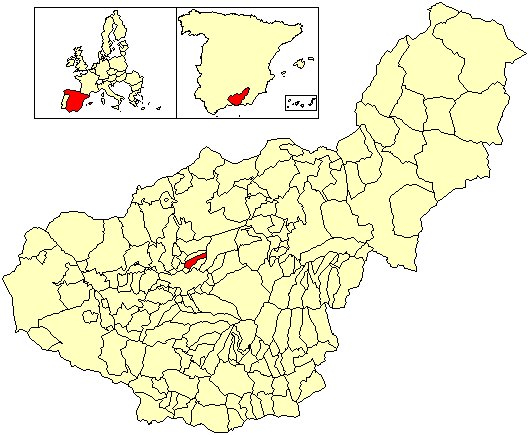 Situación del término municipal de Alfacar respecto a la provincia de Granada, en España.